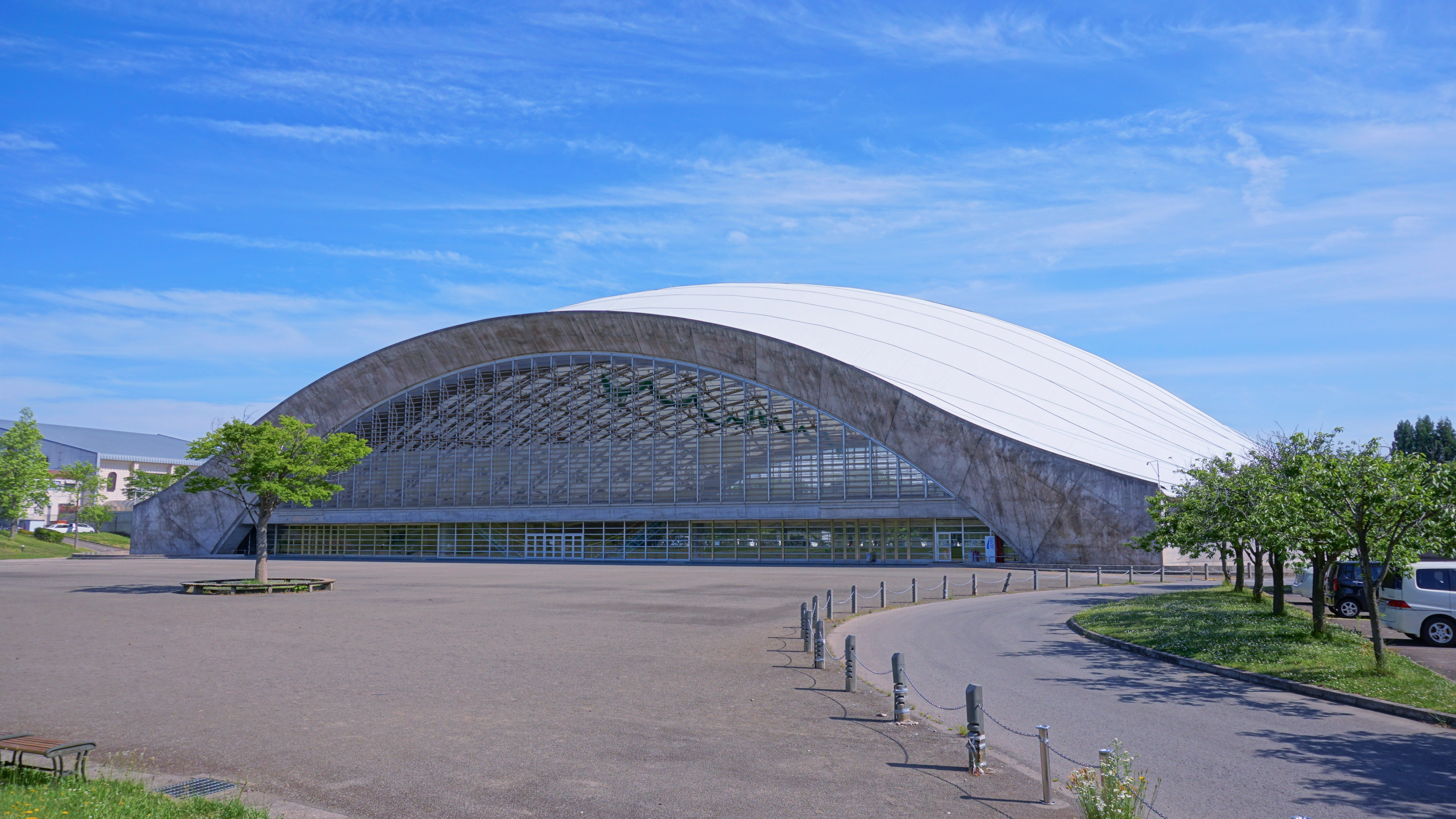 秋田県立中央公園内、あきたスカイドーム（1990年竣工）。完成から30年以上を迎える2021年度以降、国内のドーム施設として初めて屋根を張り替える改修工事が実施される。